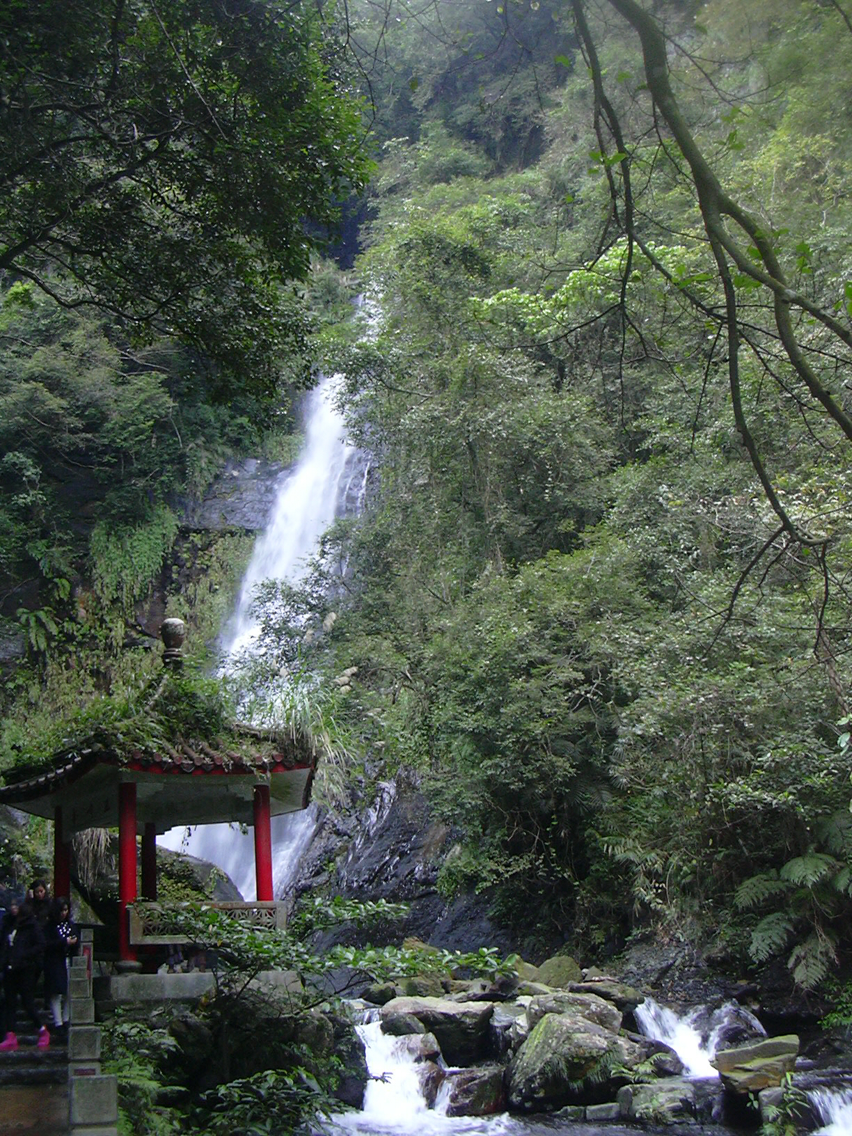 五峰旗瀑布中層，落差約24公尺。